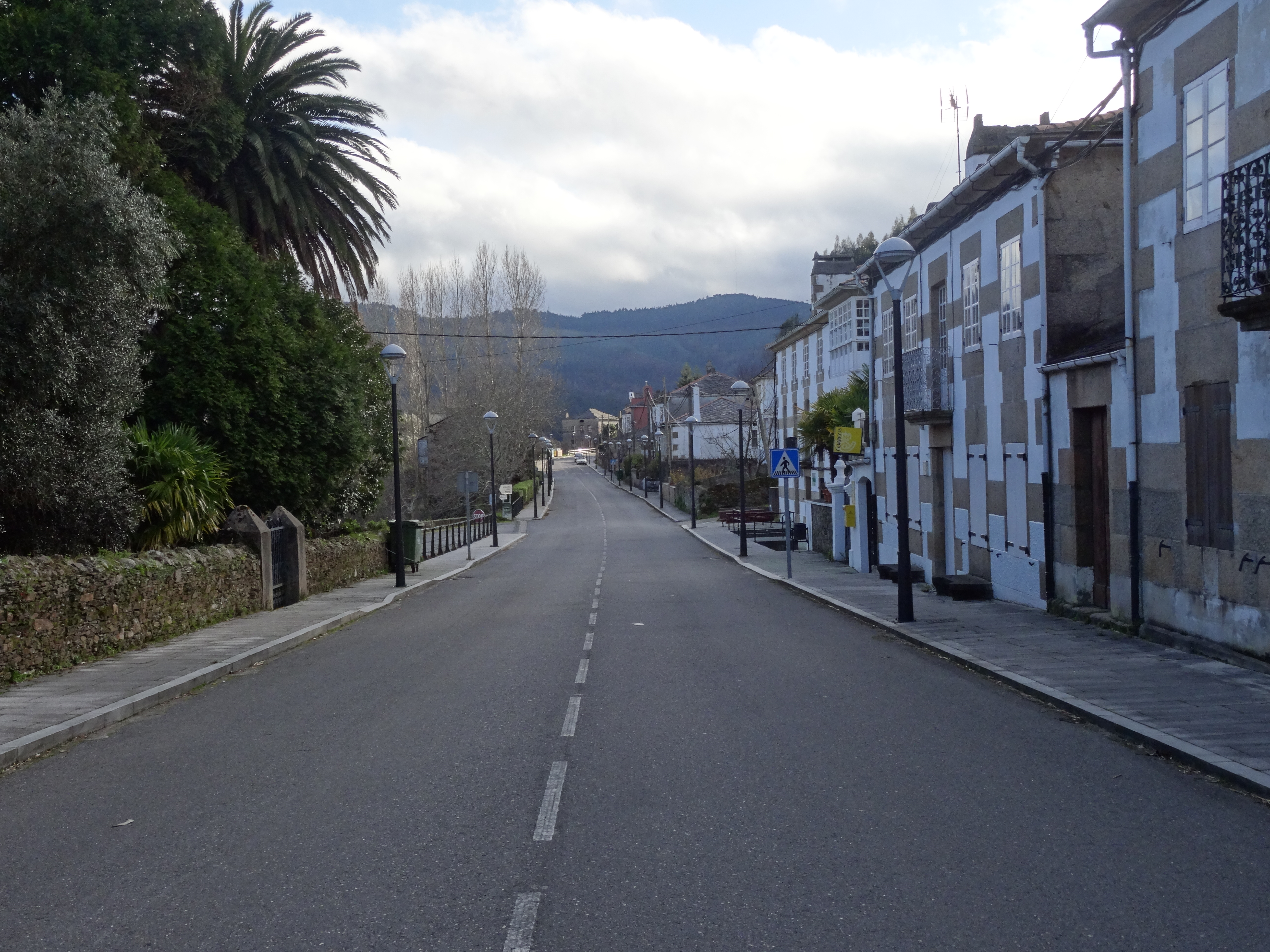 Ver título.